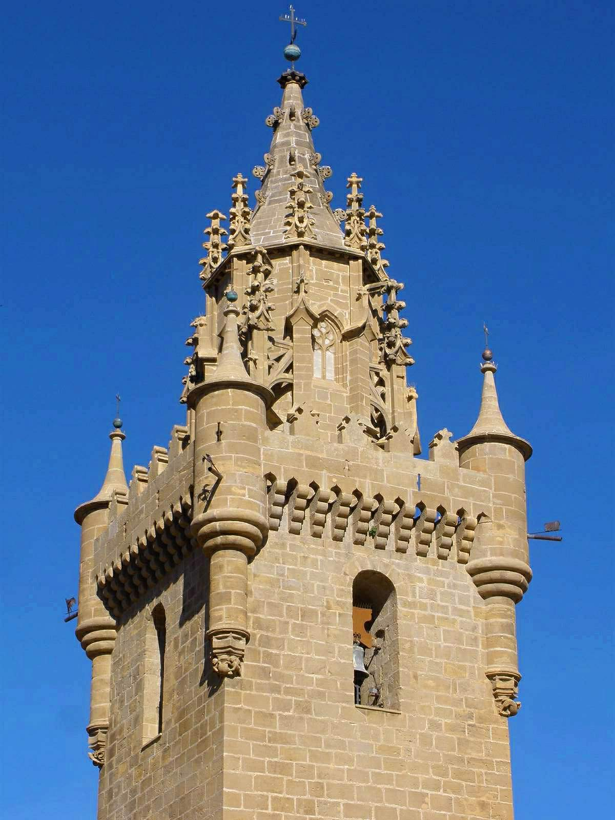 Iglesia de Santa María la Mayor, Uncastillo (Zaragoza)